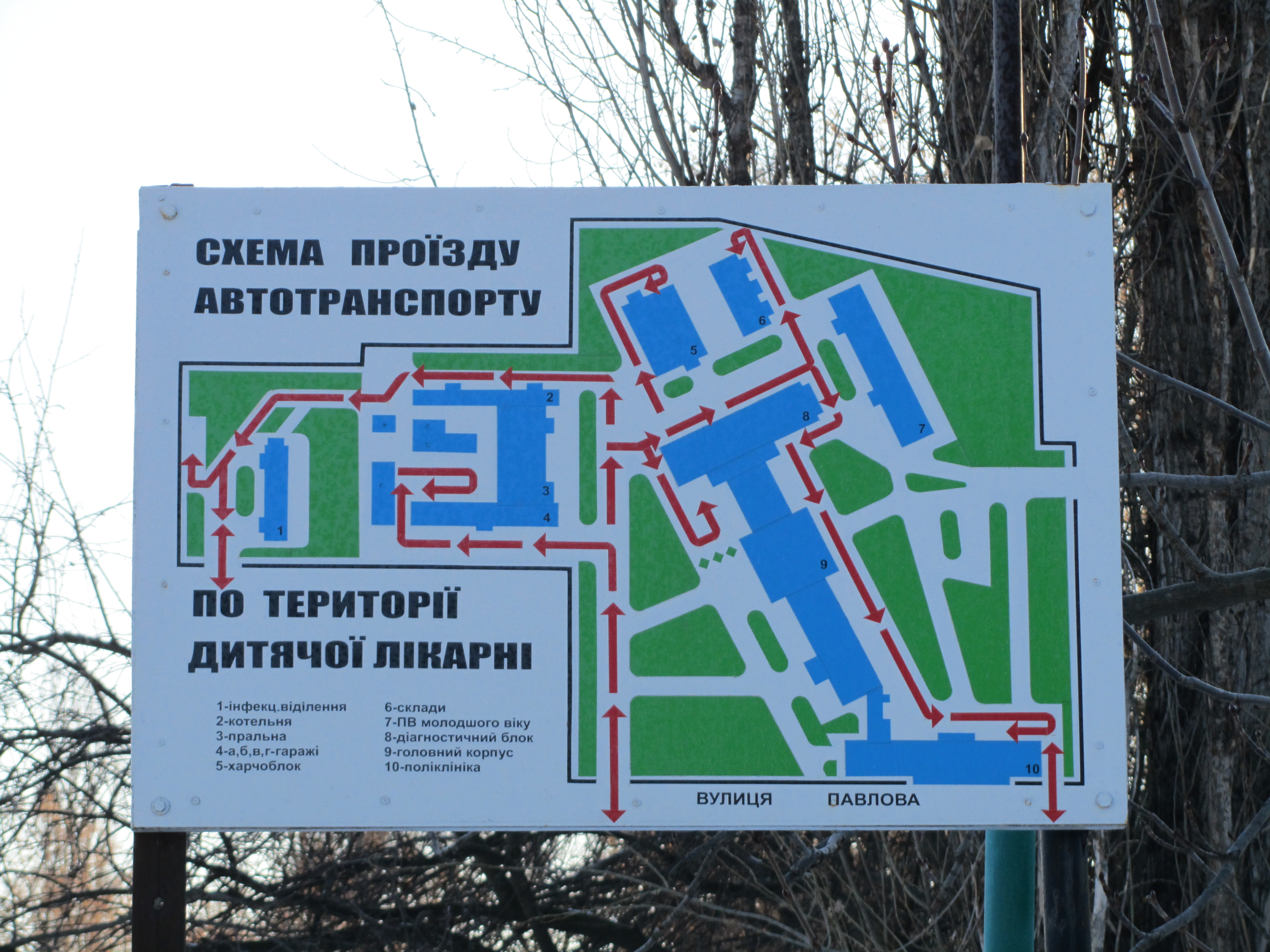 Міська дитяча лікарня у місті Кременчуці. Схема розташування будівель.